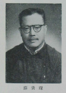 中國人民政治協商會議第一屆全體會議代表